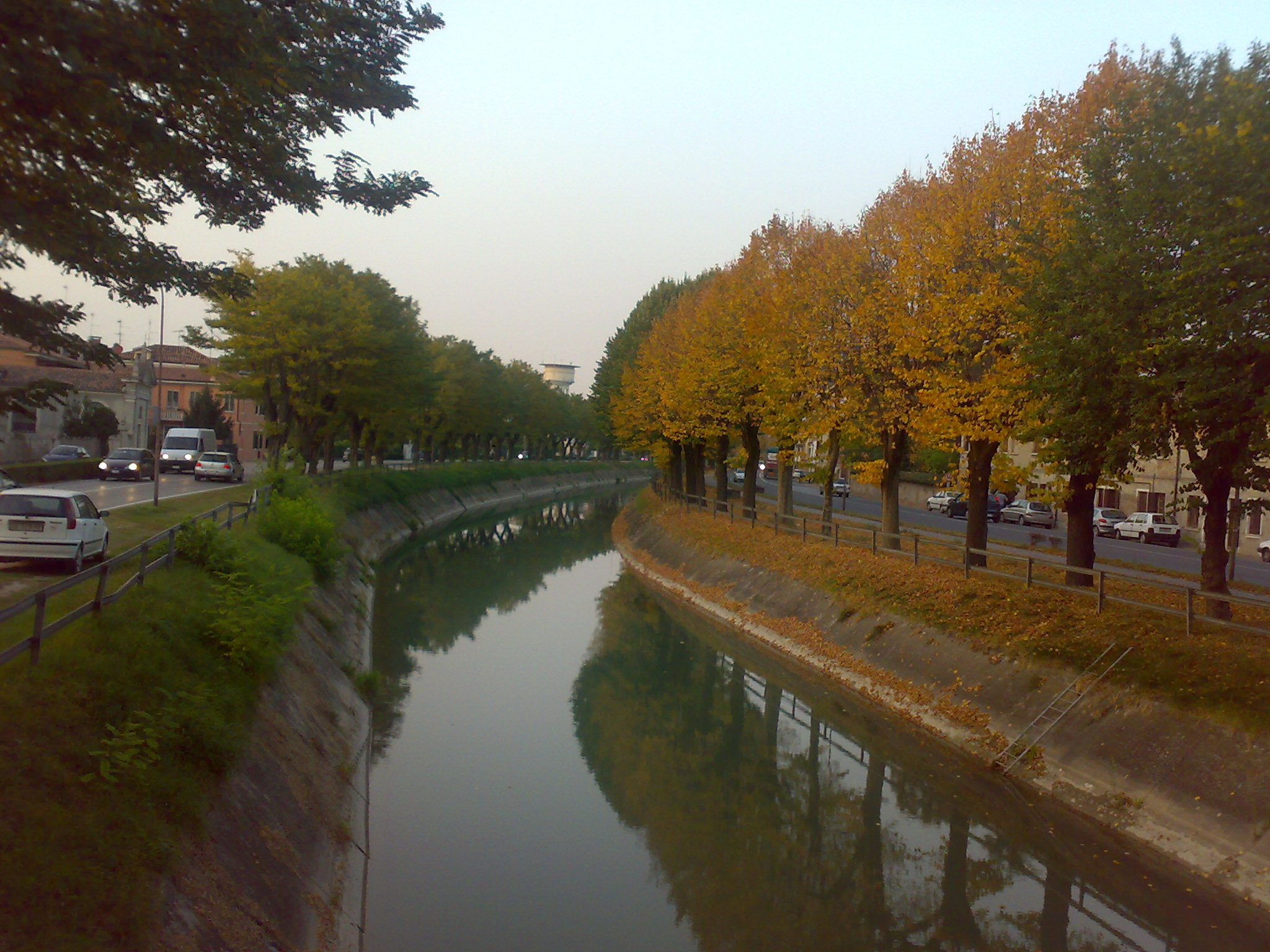 Adigetto - Badia Polesine